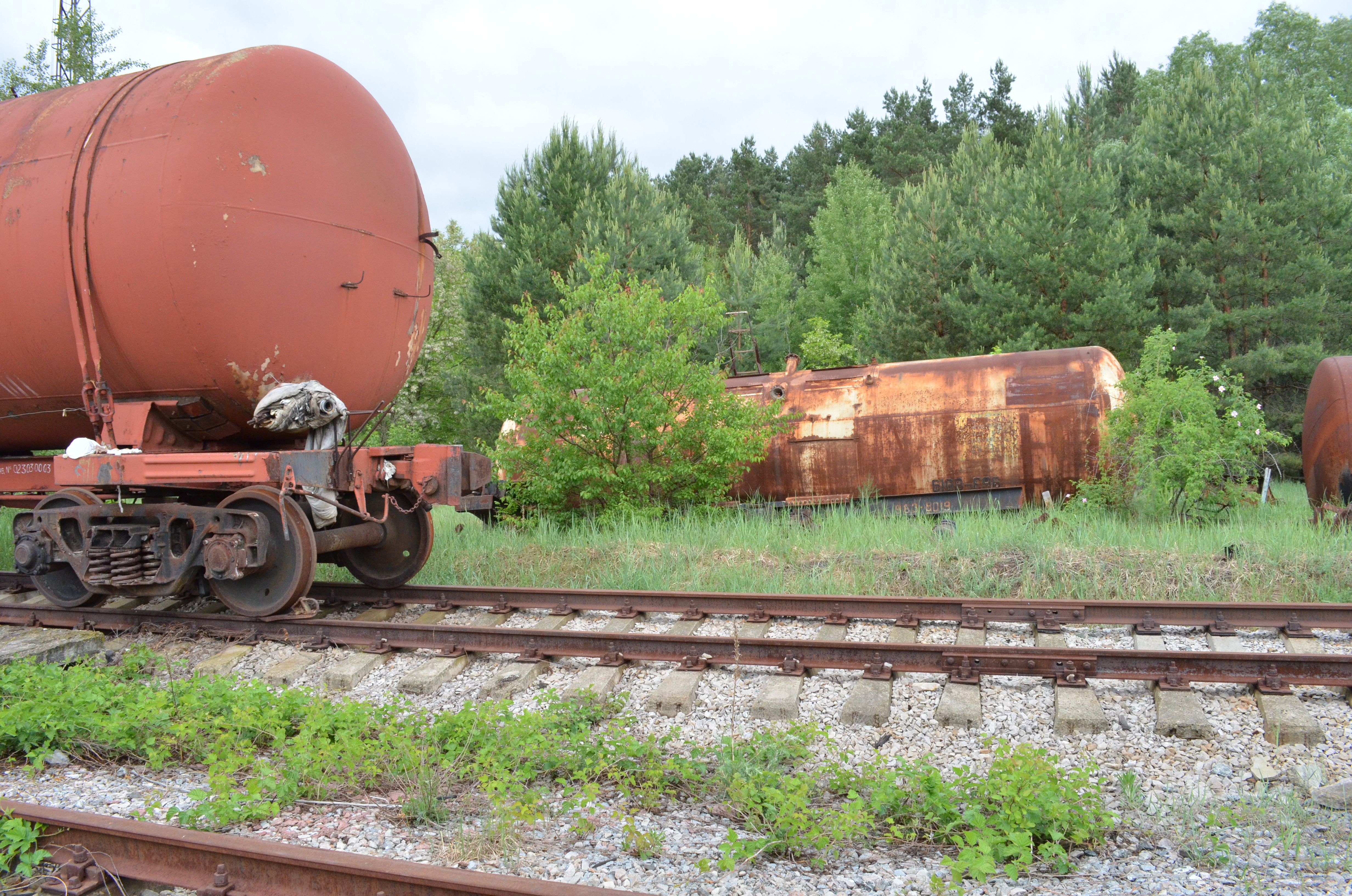 Вікіекспедиція до Чорнобиля 2013